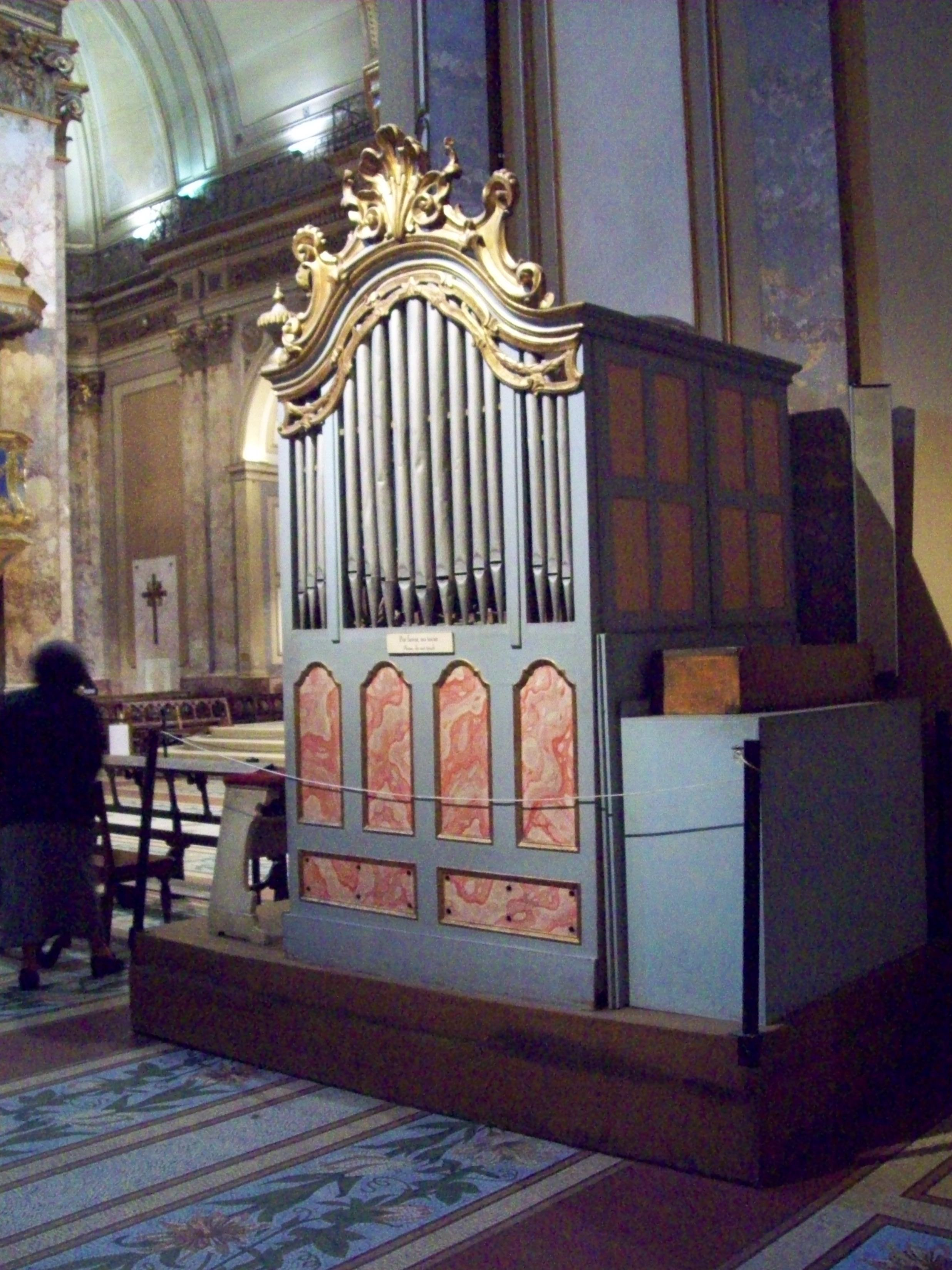 Pequeño órgano en la Catedral de Buenos Aires.